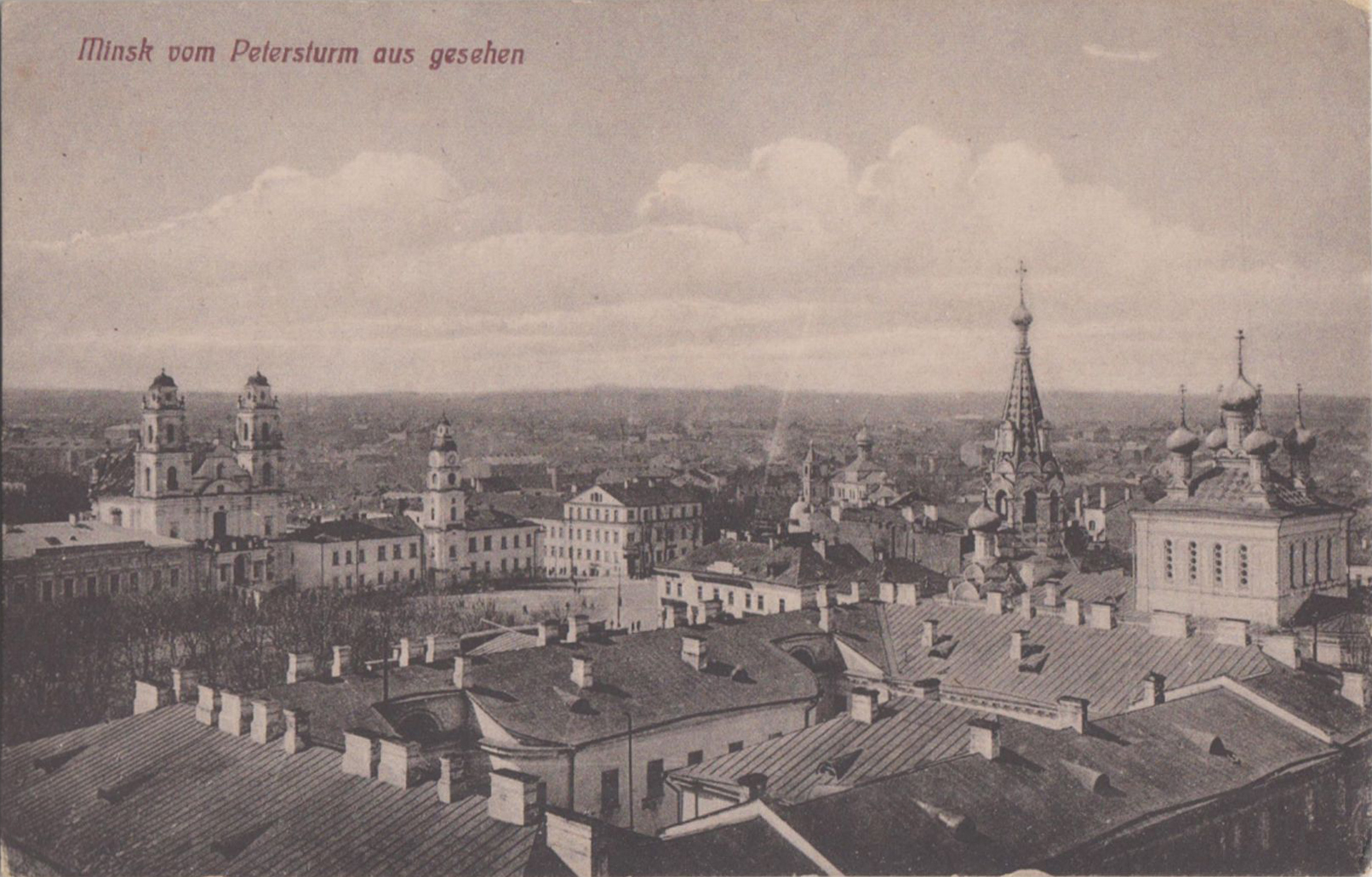 Беларуская (тарашкевіца): Менск (Miensk), Высокае Места (Vysokaje Miesta) з боку вуліцы Валоцкай (vulica Vałockaja)